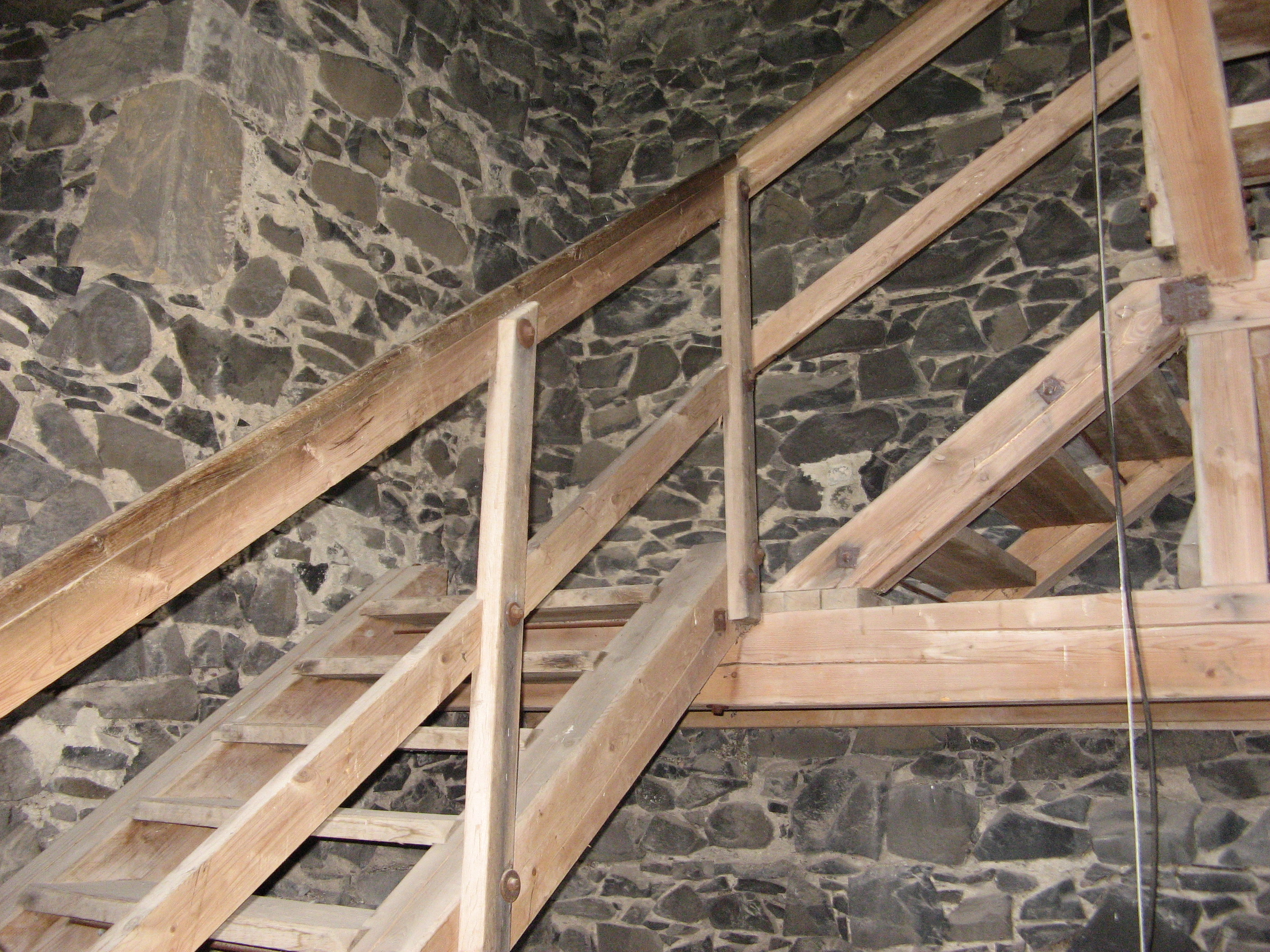 Hazmburk, schodiště v Bílé věži